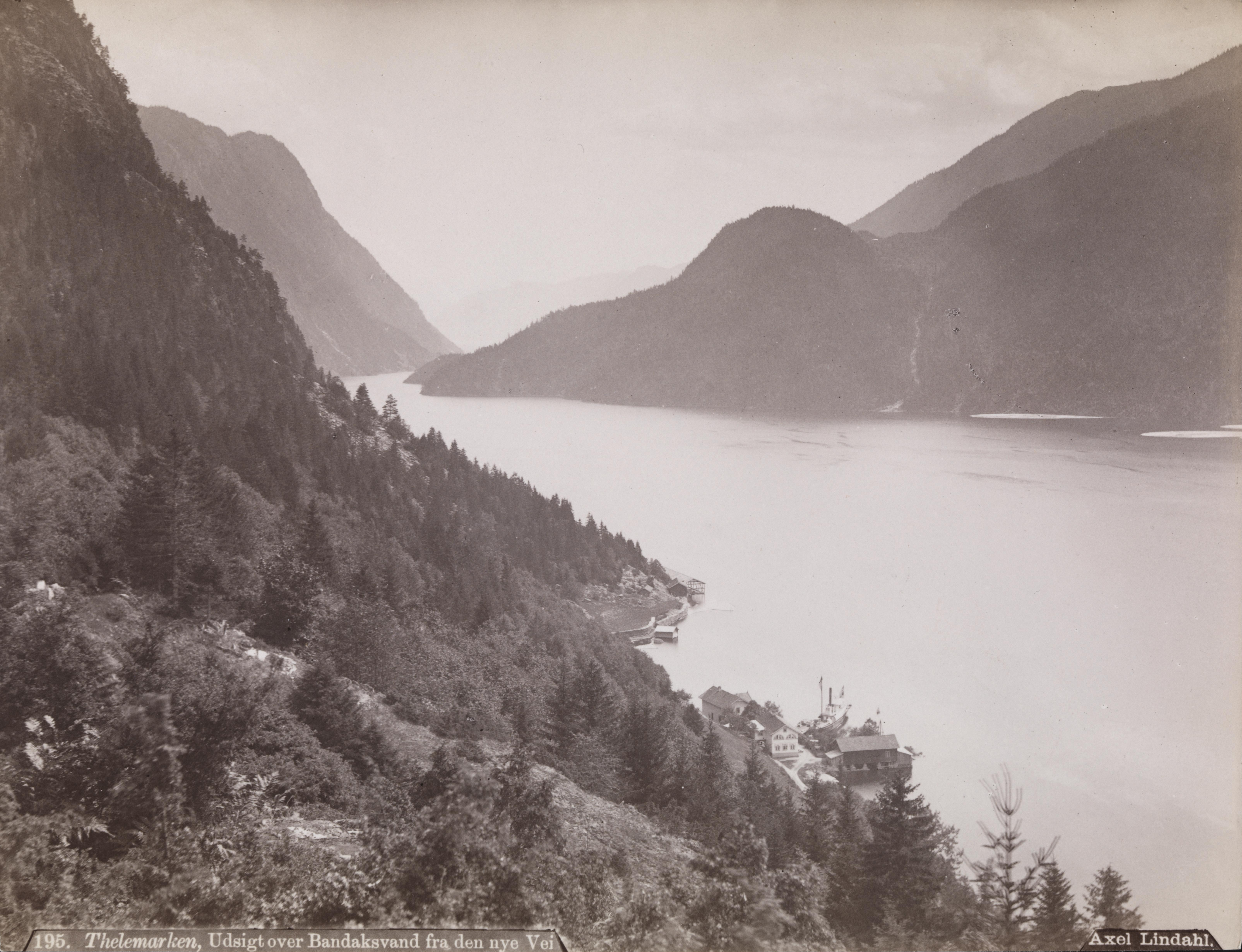 Sted: Bandak Kommune: Tokke Fylke: Telemark Tagger: landskapsfotografi